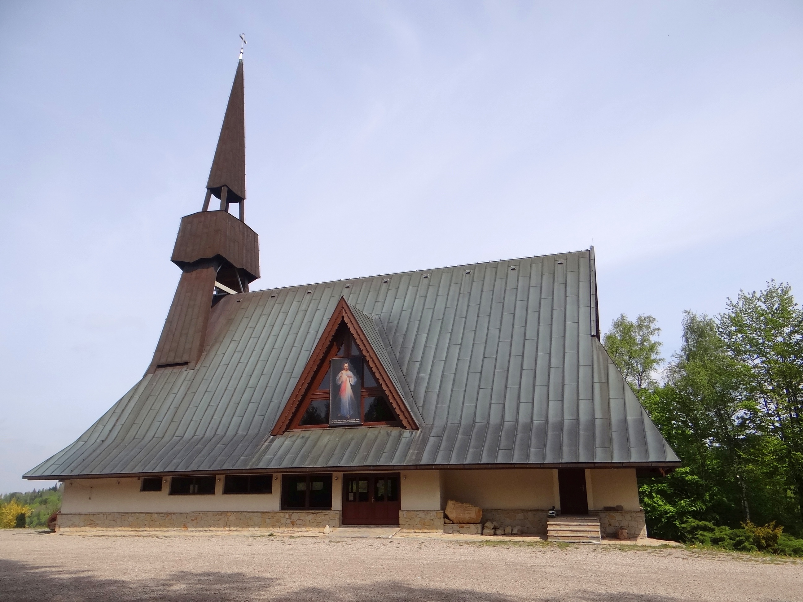 Kościół w Jamnej